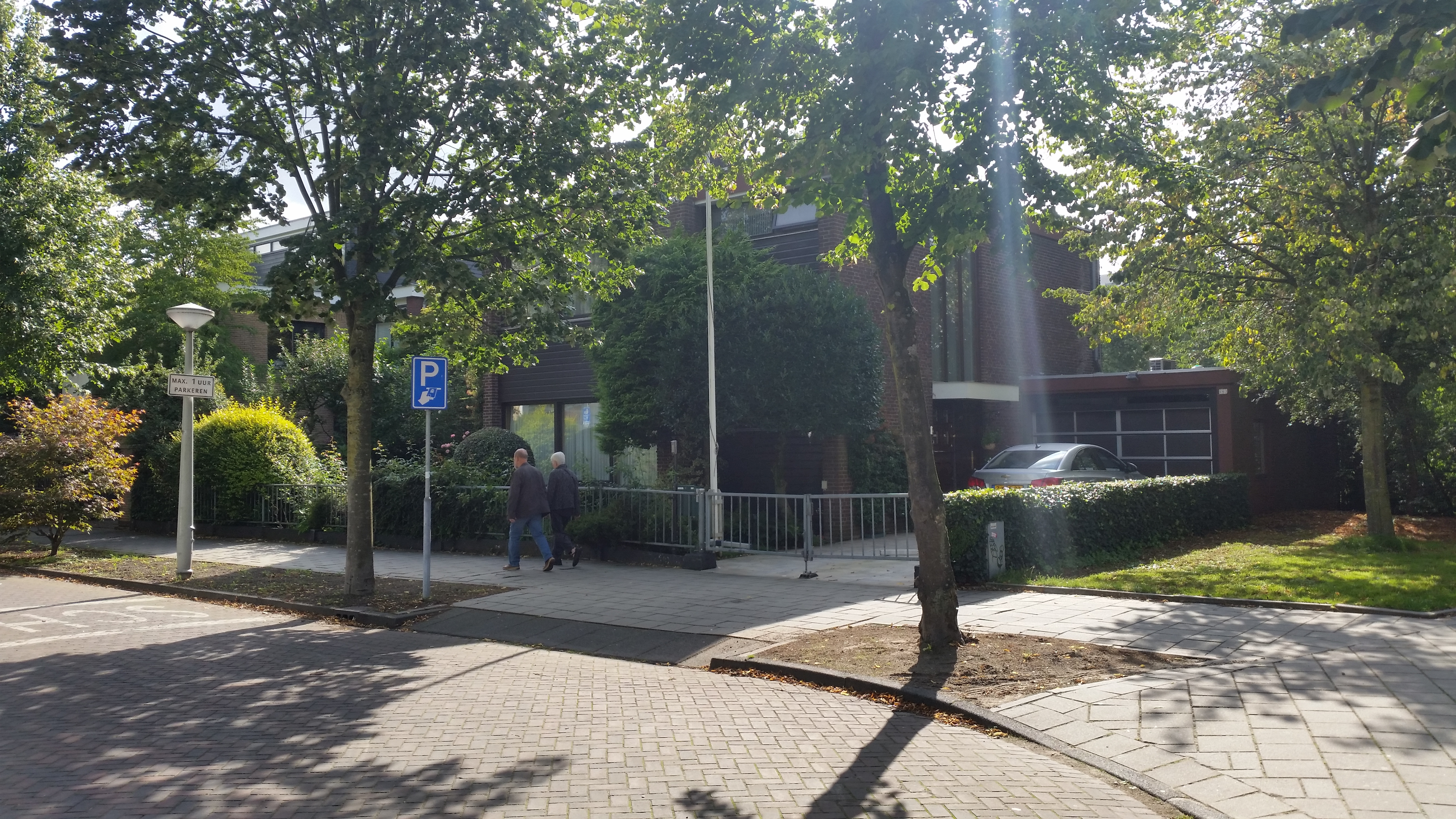 Stadsvilla